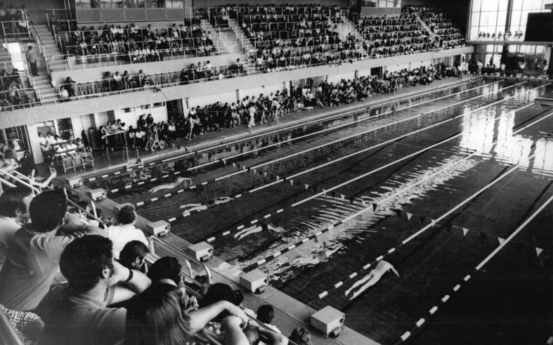 Berlin, Schwimmhalle ADN-ZB Mittelstädt 11.8.76 Berlin: Sportstätten-Blick in die vollbesetzte Schwimmhalle des Berliner Sportforums während der 27. Meisterschaften der DDR im Sportschwimmen vom 1.-5.6.1976.